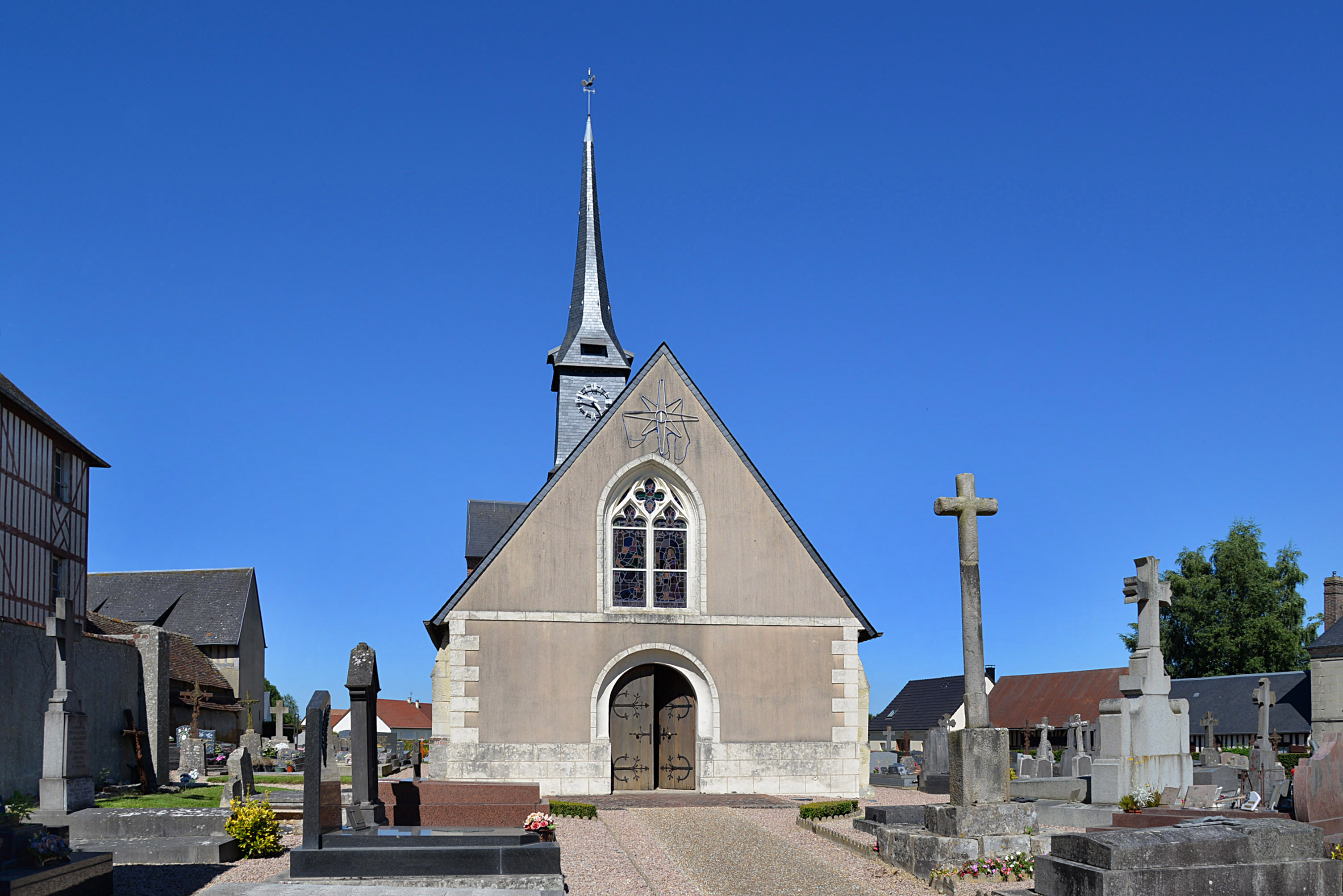 Saint-Cyr-du-Ronceray (Calvados)